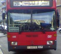 Unidad 1885 de Bilbobus; Mercedes 0-405